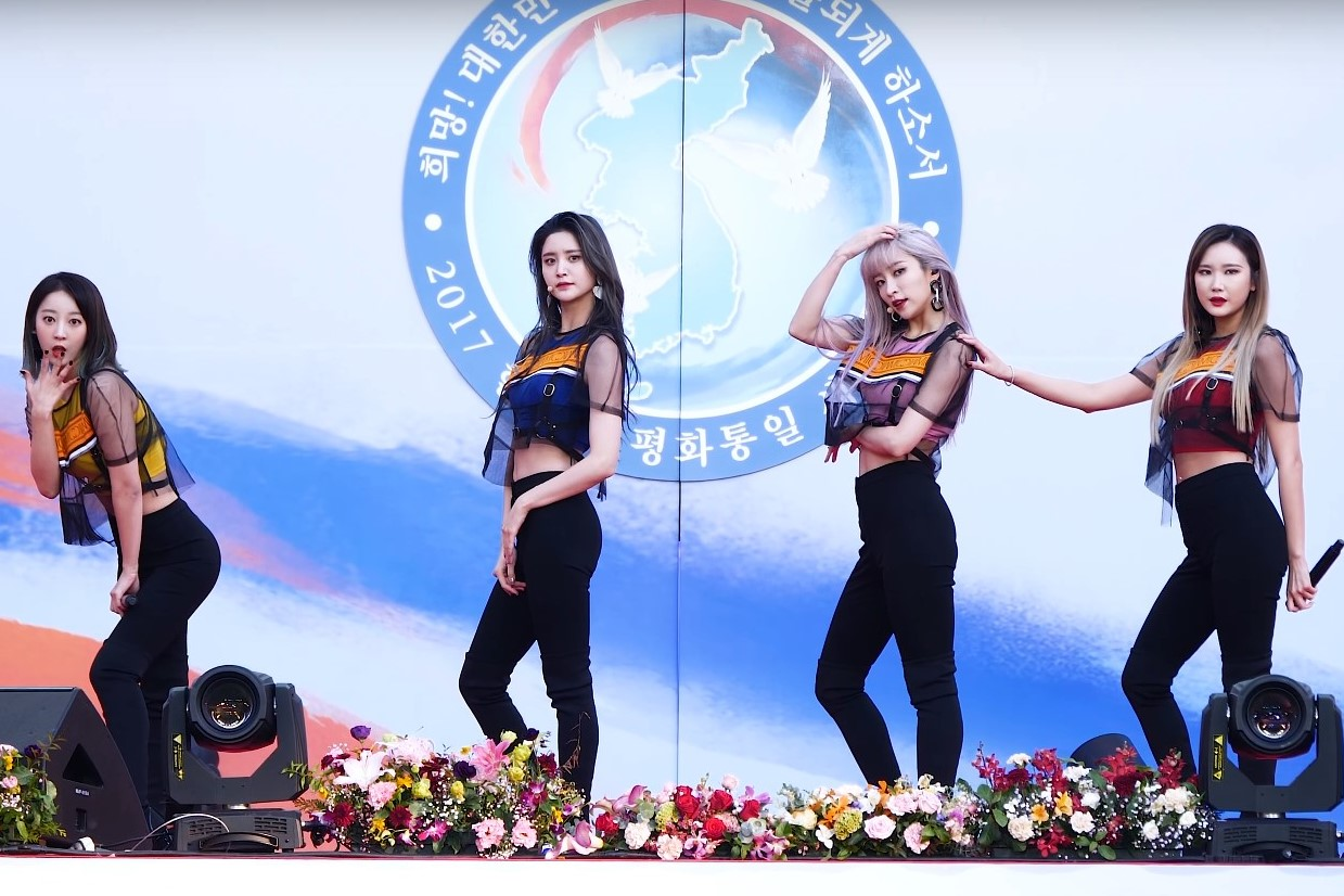 171111 청소년 잼버리 - EXID '덜덜덜'